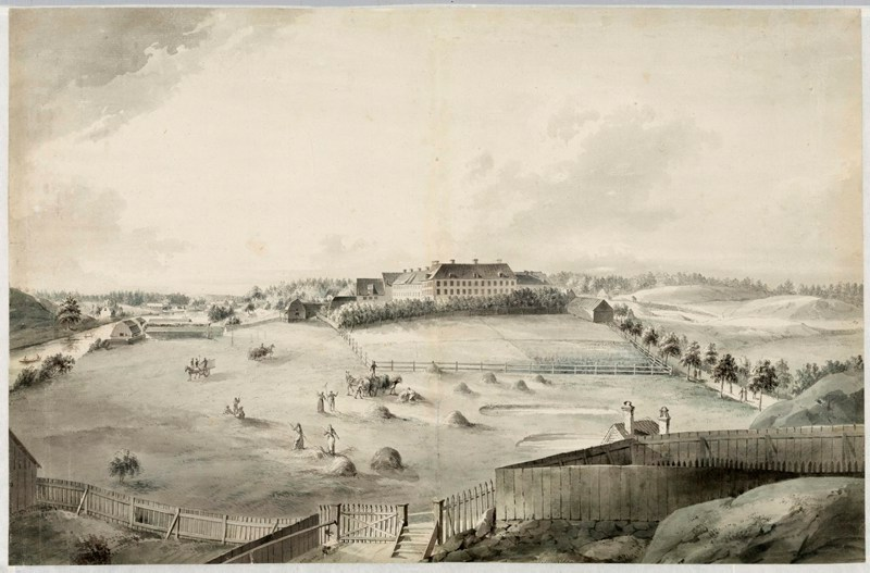 Rörstrandsområdet med Rörstrands slott i nuvarande Vasastan i Stockholm på 1790-talet, lavyr tillskriven Johan Fredrik Martin (1755-1816). Inventarienummer: 117500, Stadsmuseet i Stockholm. Unikt dokument ID: SSM_11750_0.